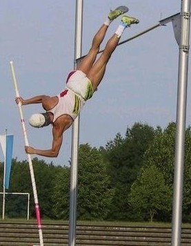 pole vault